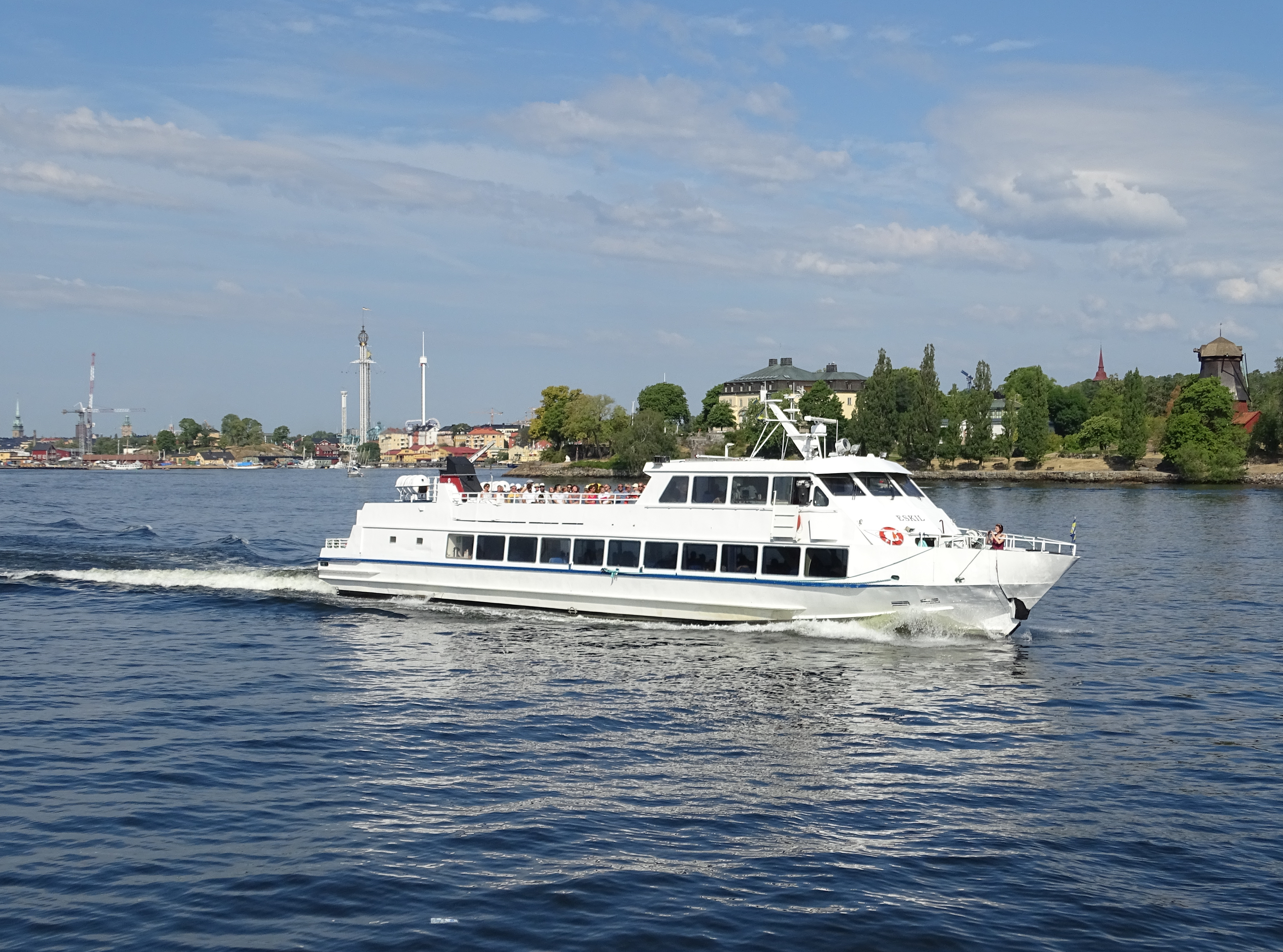 M/S Eskil, Stockholm, Zweden.